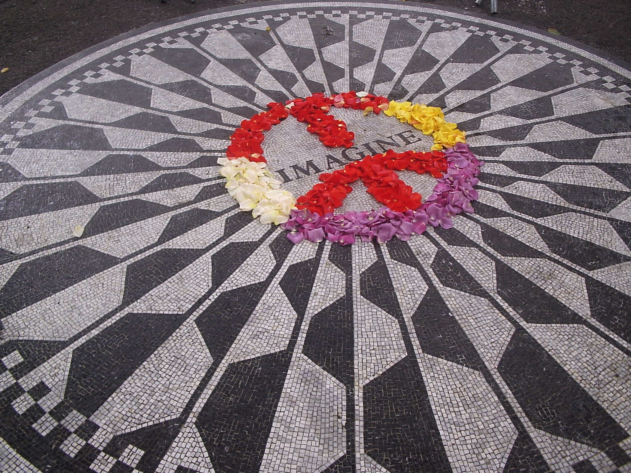 Memorial di John Lennon, negli Strawberry Fields a Central Park, New York city